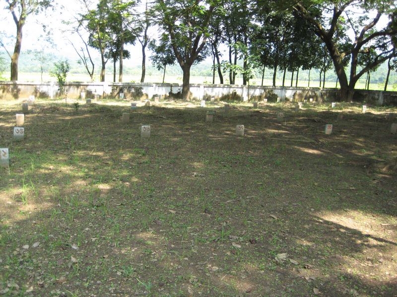 Dolura, Sunamgonj, Sylhet.